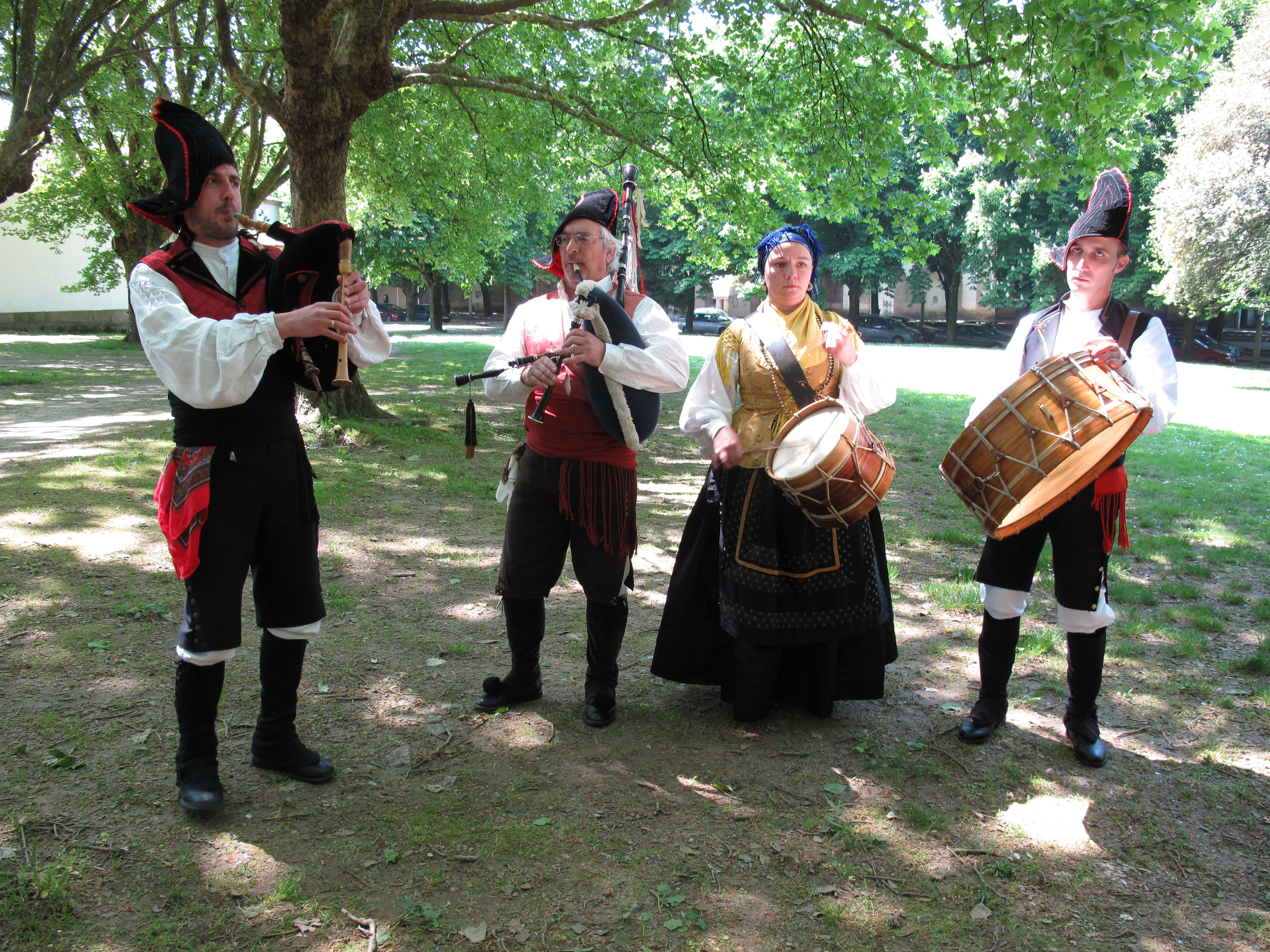 Día Internacional dos Traballadores en Santiago de Compostela. 2009